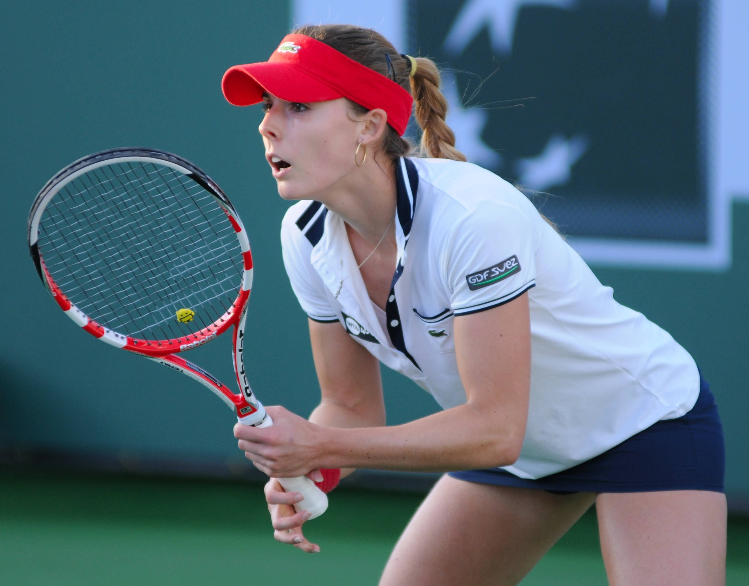 BNP Paribas Open 2013